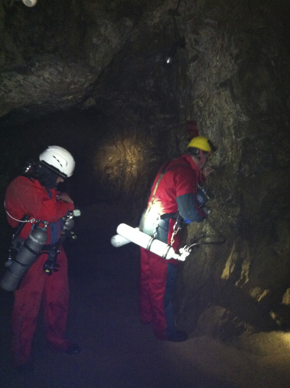 Höhlentaucher auf dem Weg zu einer Tauchstelle in der Kluterthöhle, Ennepetal.